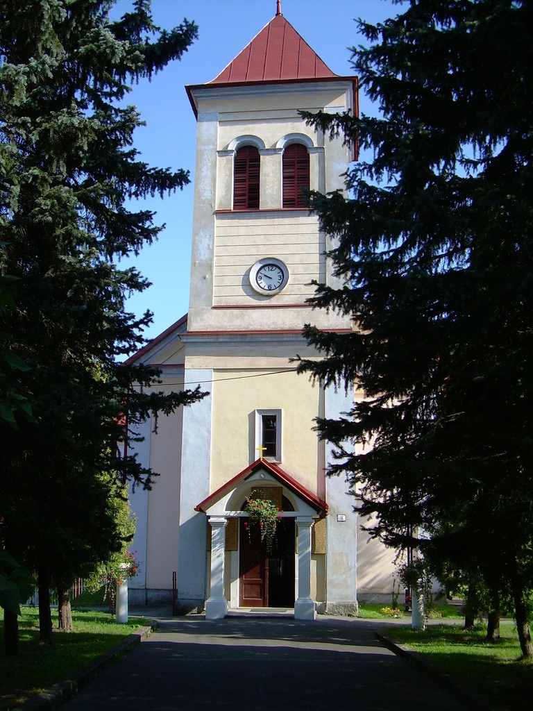 Árvaváralja temploma (Szlovákia)